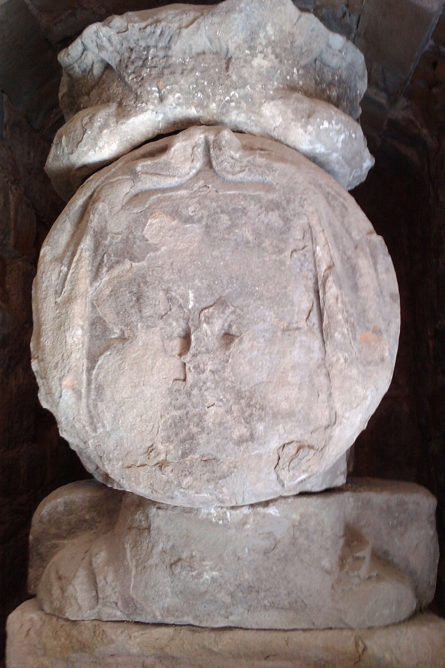 Tete original de Dame Carcas, conservée au musée